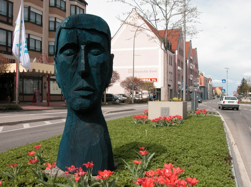 blauer Kopf im Stadtzentrum von Königsbrunn